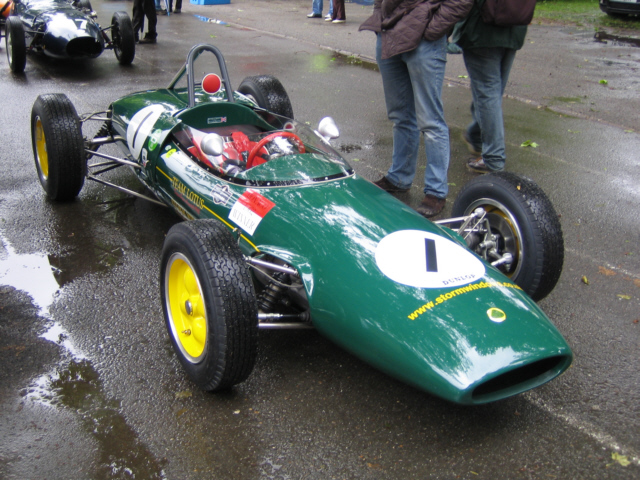 Lotus 22 at Pau GP 2007